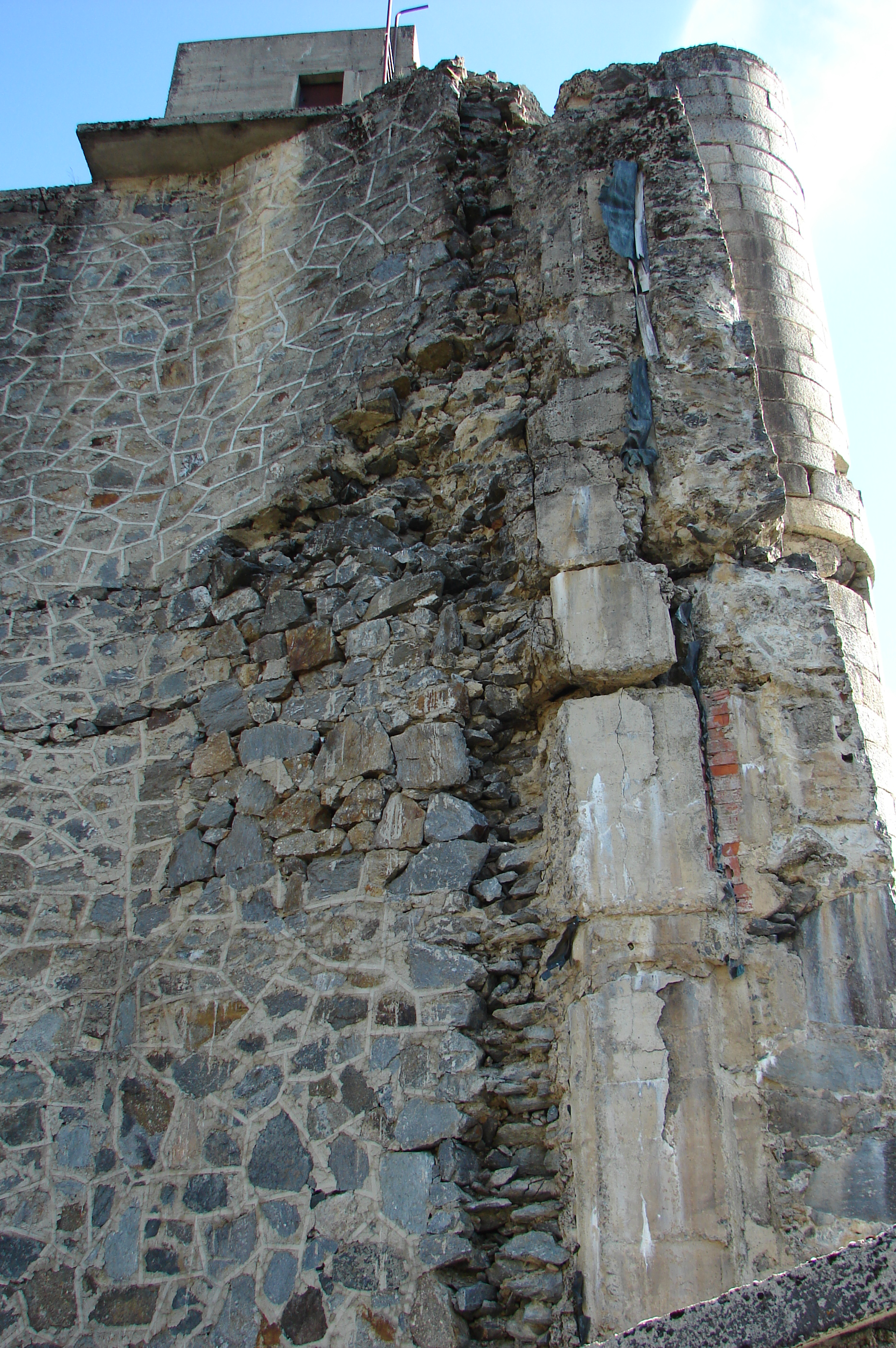 Detalle de los materiales de construcción del muro de contención de la Presa de Vega de Tera (Presa Rota)